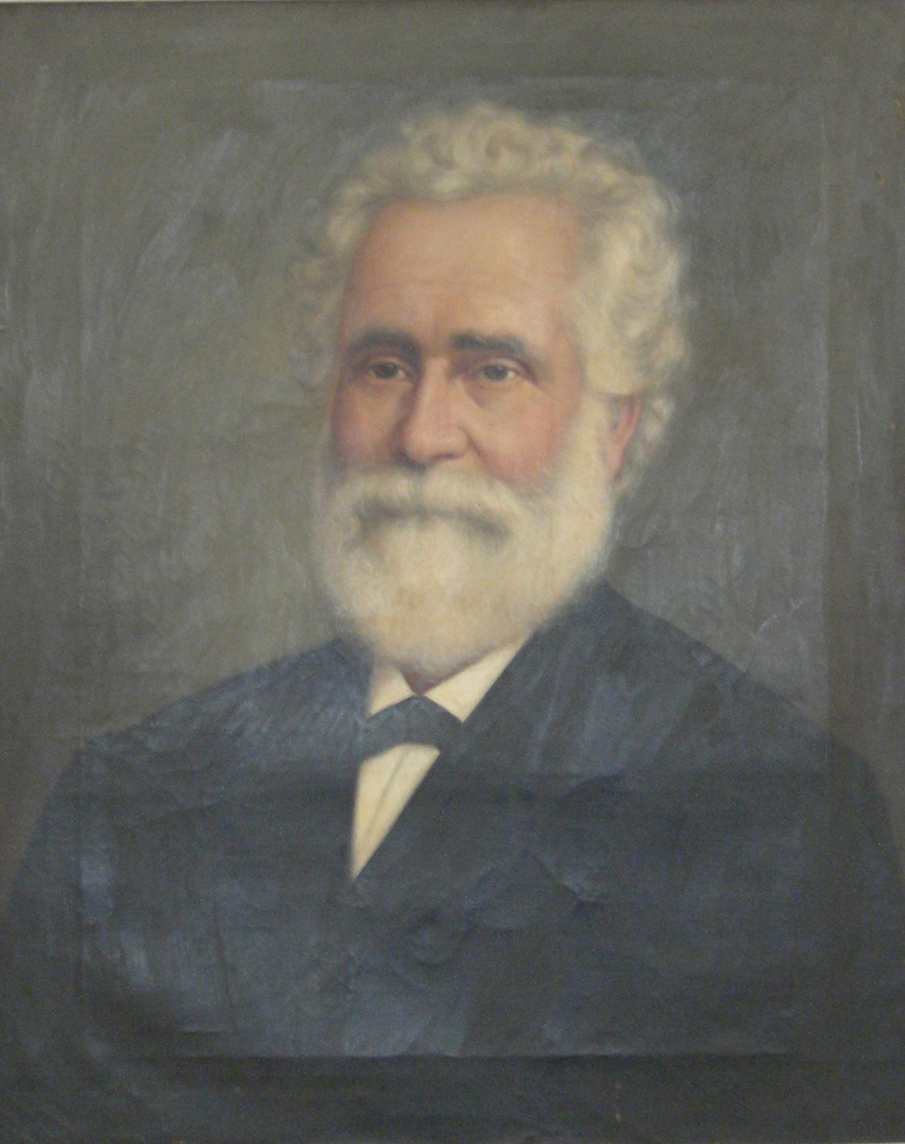 Anonymous portrait of I.C. Brătianu (Ion Brătianu)